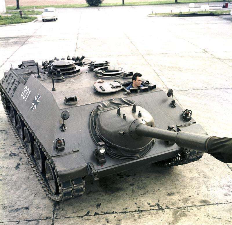 Reportage Bundeswehr Kanonenjagdpanzer, Munsterlager, KTrS III [Munsterlager, Truppenübungsplatz in der Lüneburger Heide]